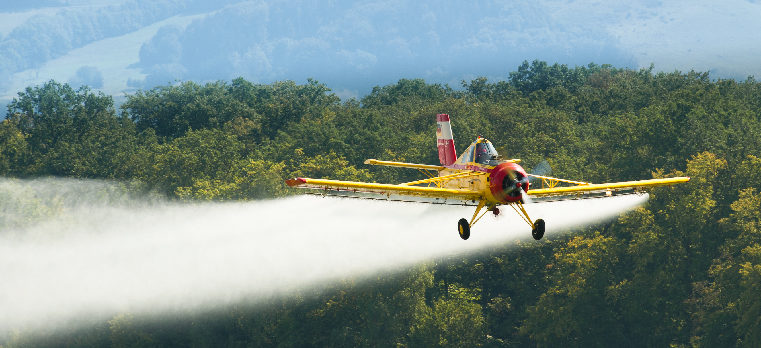 Agrarflieger Gehling PLZ-106 AR Kruk beim Oldtimer Fliegertreffen, Flugfeld Hahnweide 2013